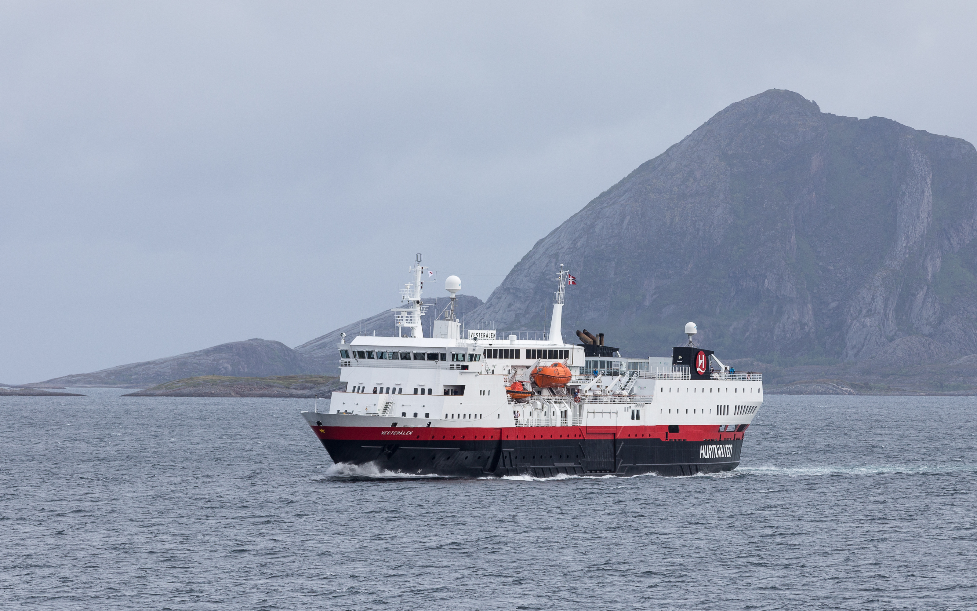 Die VERSTERÅLEN bei Amnøya